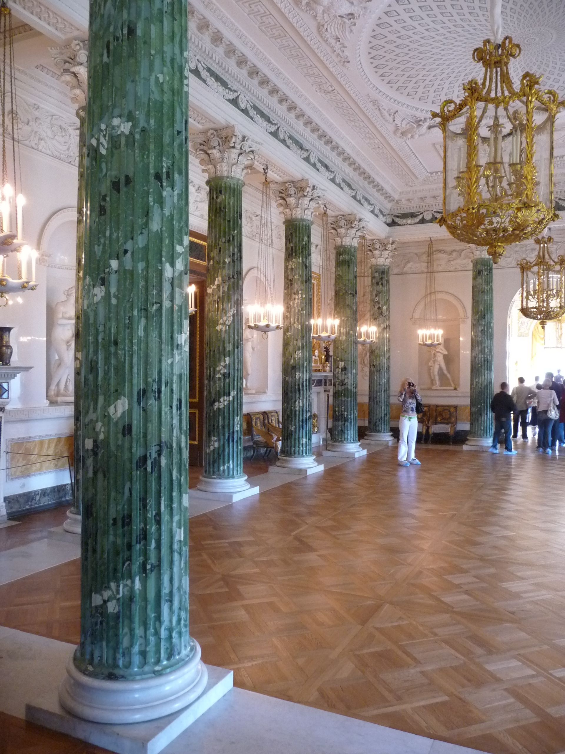 Palace-p1030762.jpg